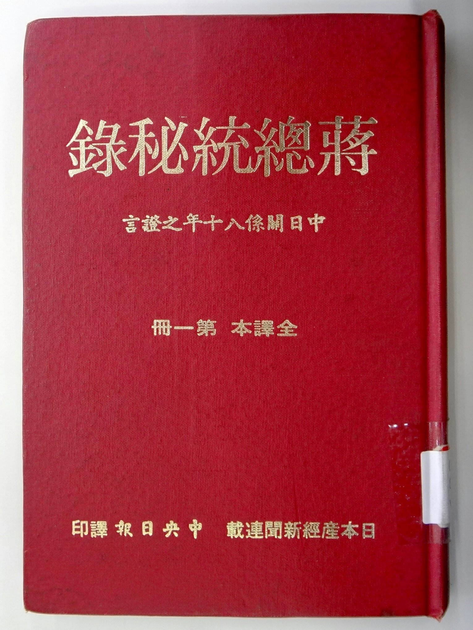 《蔣總統秘錄》中央日報社版第一冊紅皮精裝版封面。